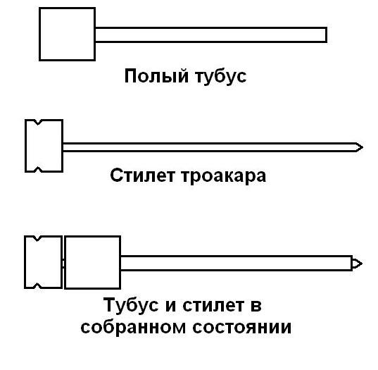 На изображении представлено устройство классического троакара: тубус и стилет.